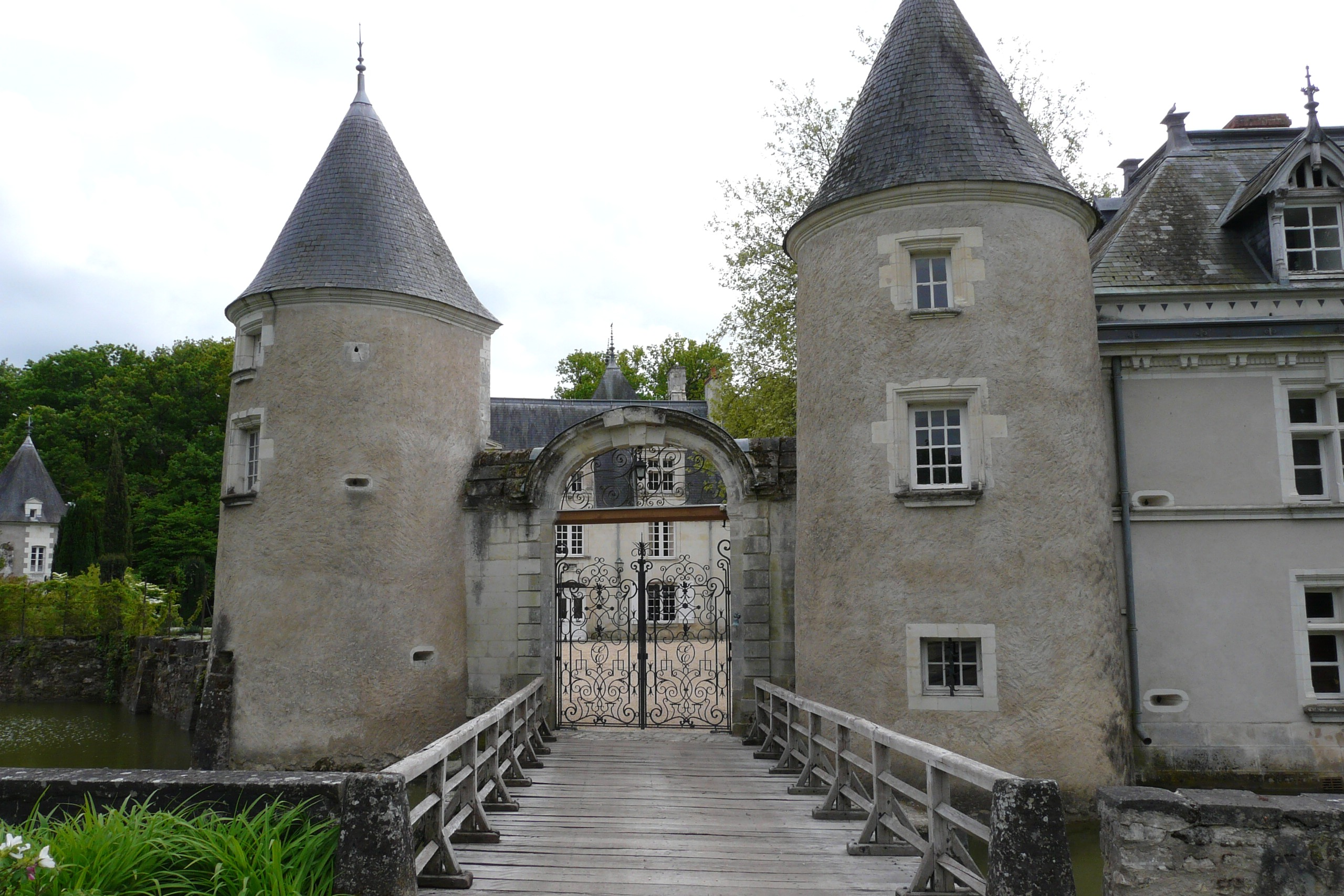 Description Château de Boisbonnard à Villeperdue dans le département d'Indre-et-Loire DateMay 2009SourceOwn work by the original uploaderAuthorBRUNNER Emmanuel,Manu25 Château de Boisbonnard à Villeperdue dans le département d'Indre-et-Loire